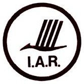 IAR Brașov